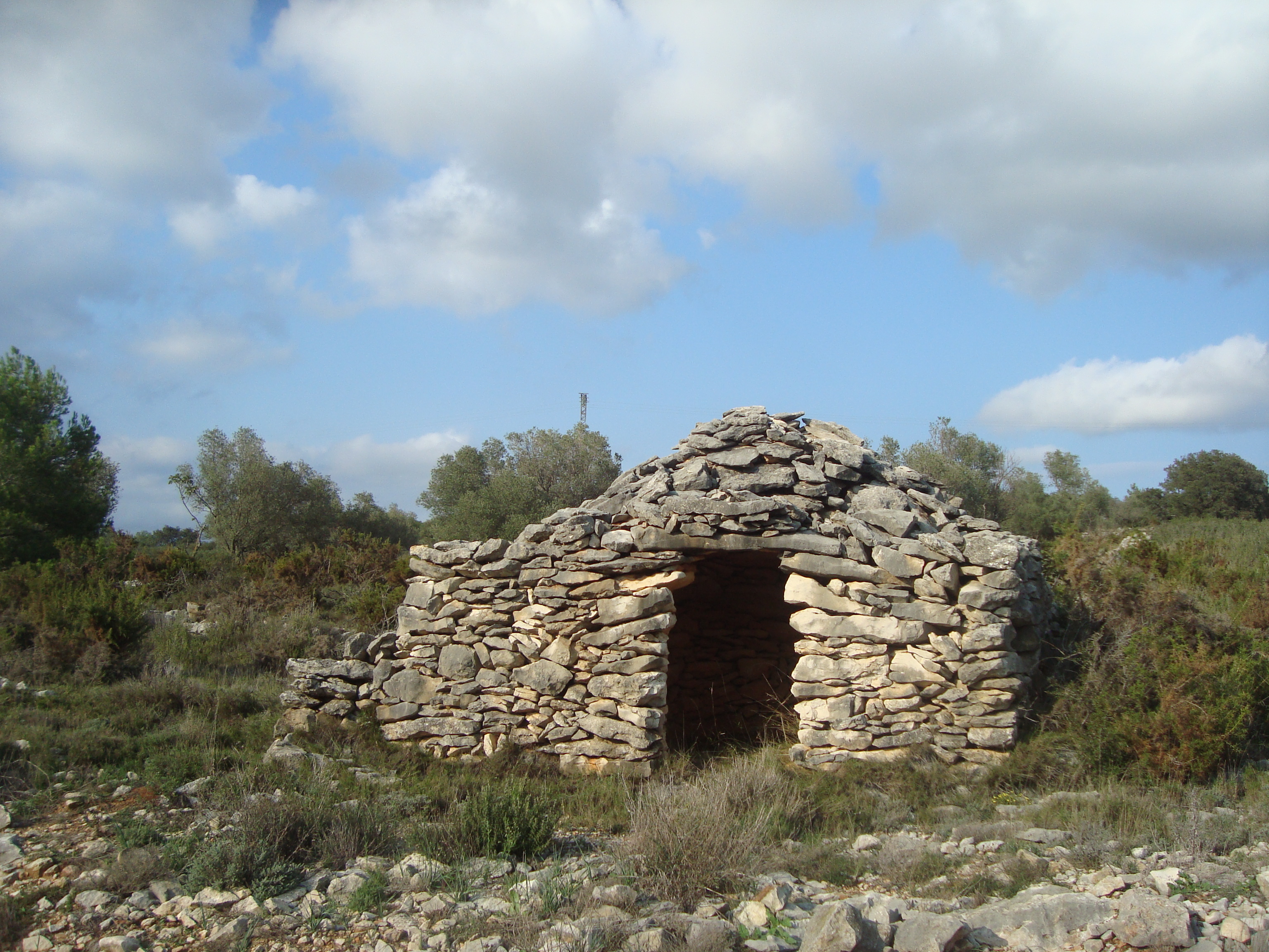 Barraca de piedra, arquitectura en piedra seca